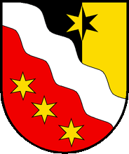 Wappen Glarus Mitte Schweiz